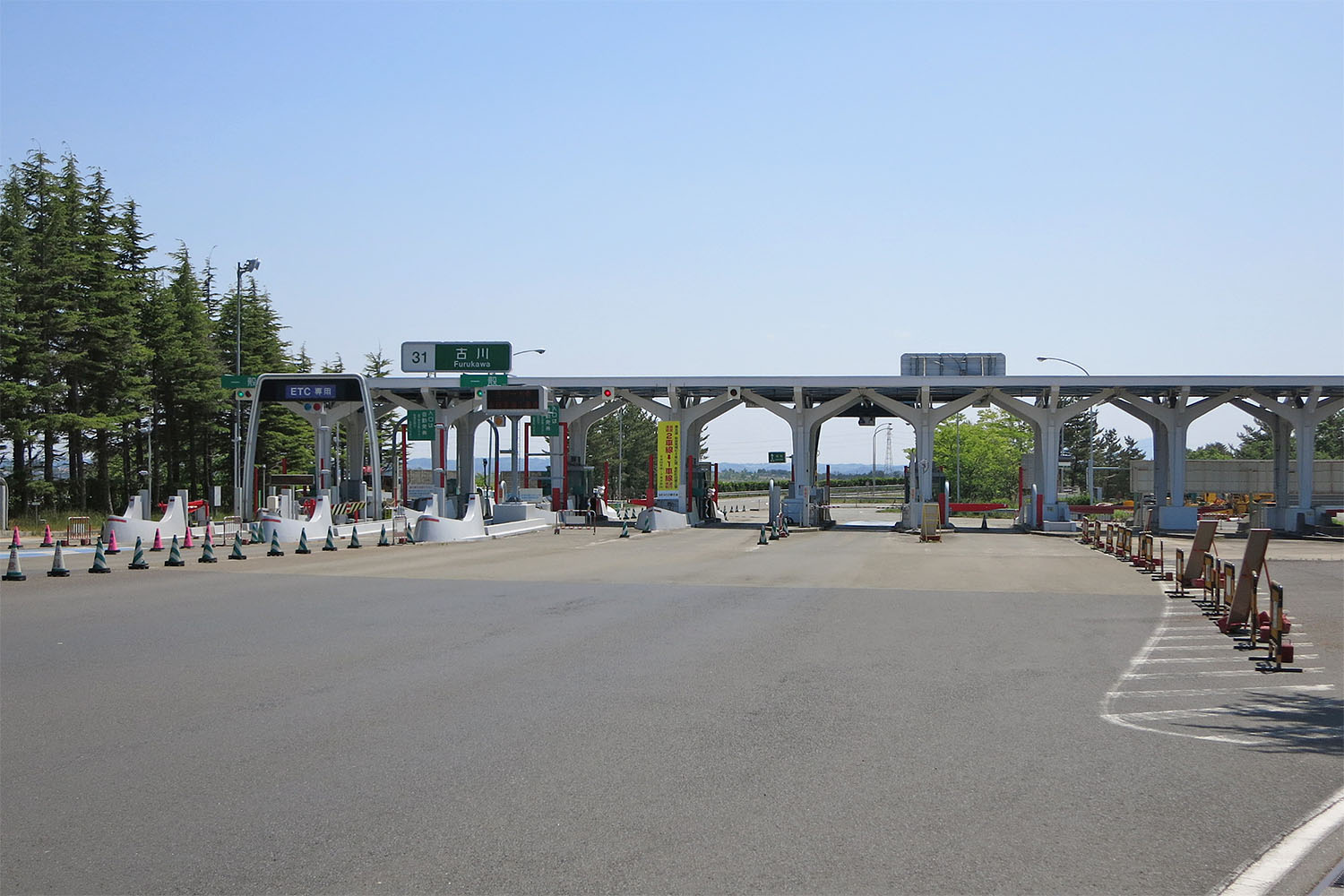 東北自動車道 古川インターチェンジ